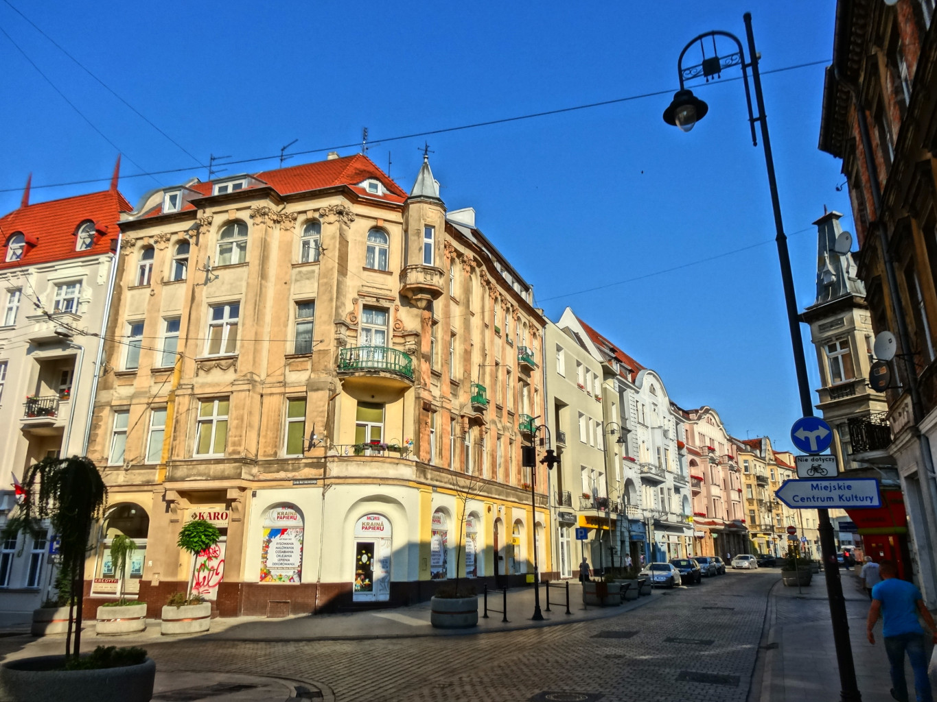 Ulica Dworcowa w Bydgoszczy w rejonie skrzyżowania z ul. Marcinkowskiego